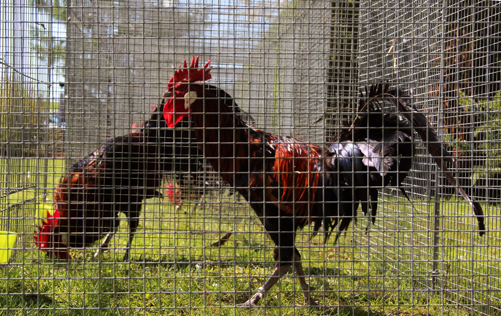 Hanen bij de kraaiwedstrijd in Weinbergen (2016)